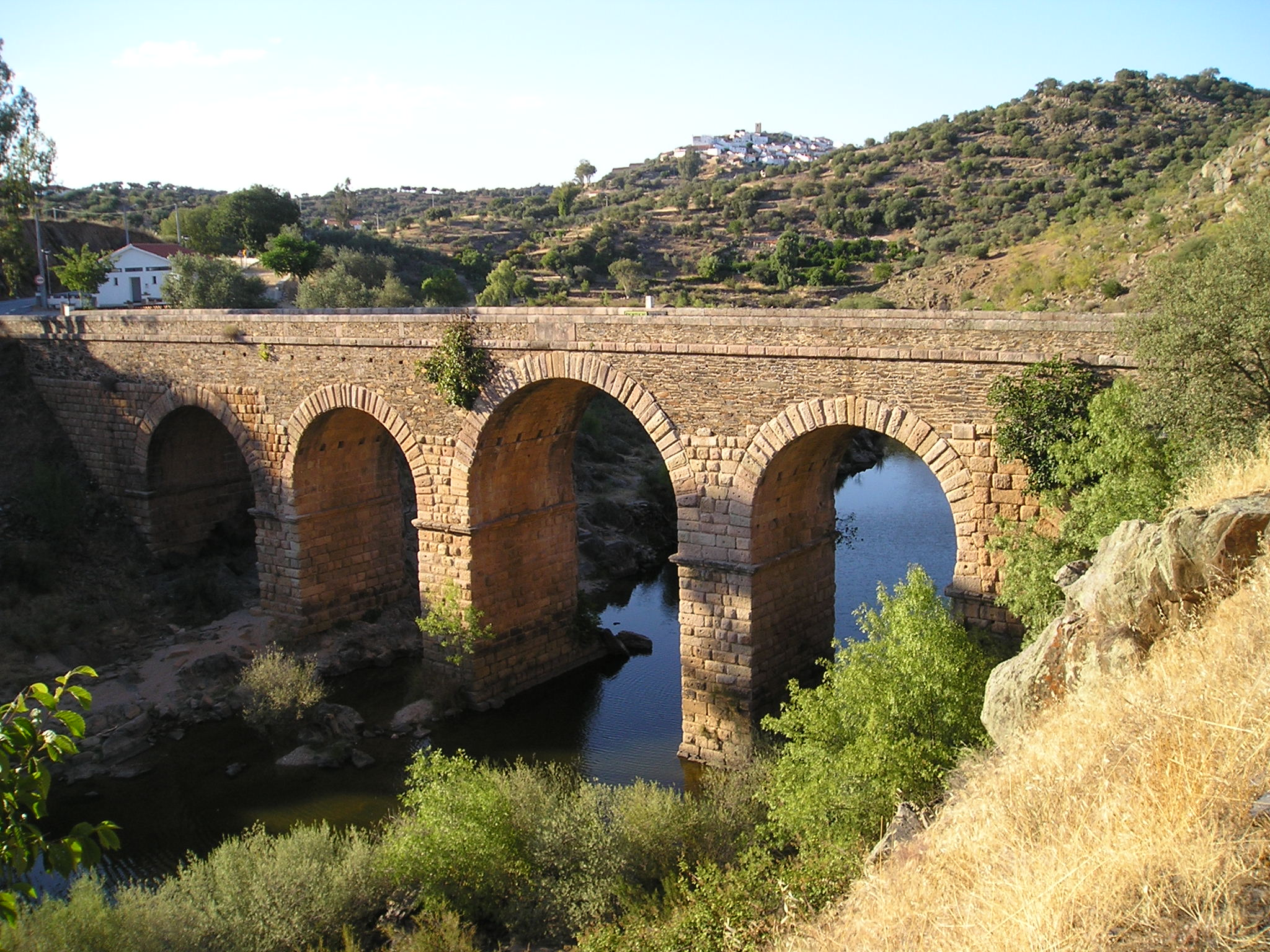 Puente romano sobre el río Erjas, en la frontera entre Portugal y España entre la provincia de Cáceres y el distrito de Castelo Branco, construido bajo Trajano. Conocido también por Puente de Segura.